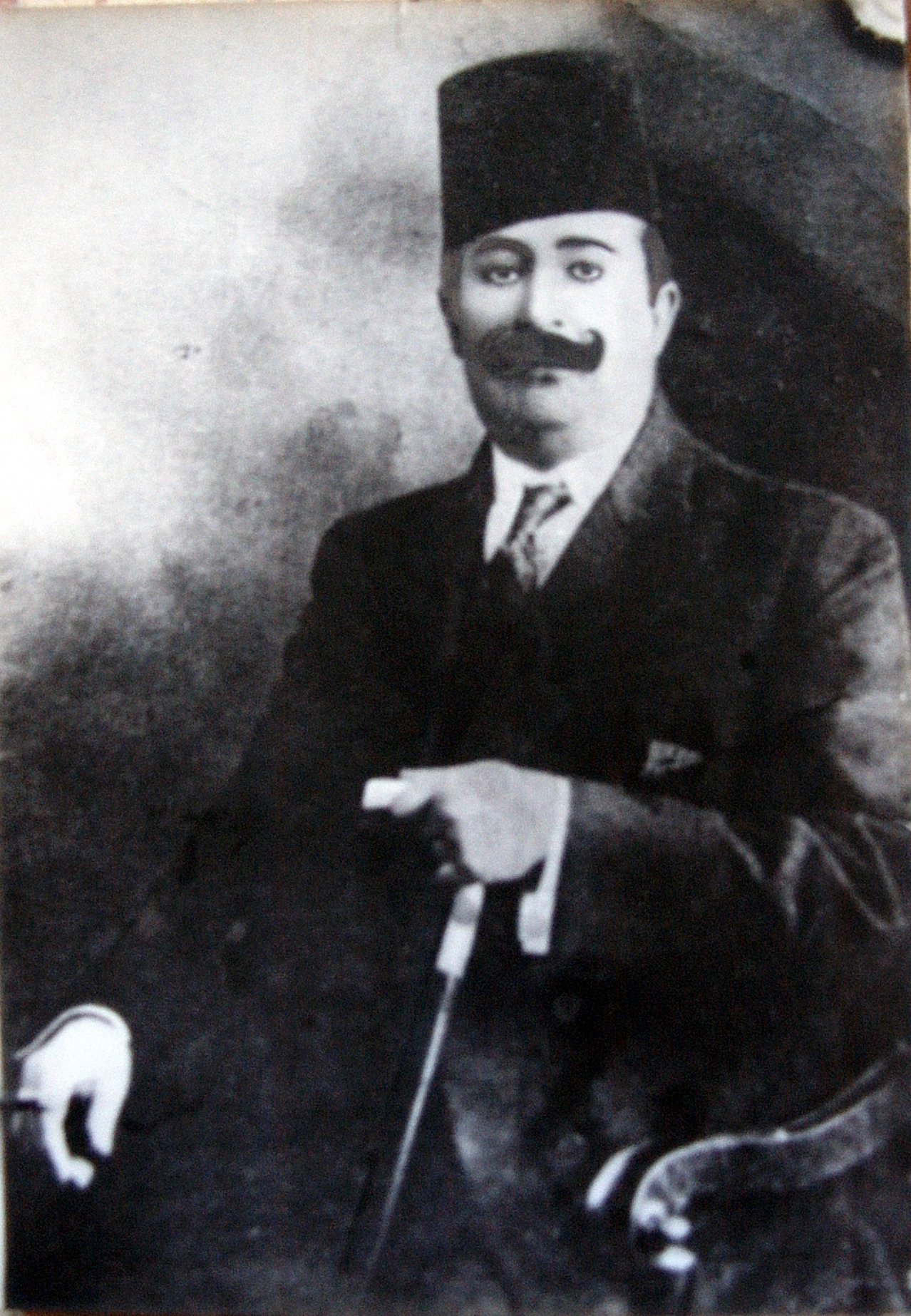 كامل خليل الأسعد (1870 - 1924) سياسي لبناني من نسل آل علي الصغير، عاصر أواخر الدولة العثمانية والحرب العالمية الأولى، كما عايش الإنتداب الفرنسي على لبنان وقيام دولة لبنان الكبير، تولى مناصب عديدة في الدولة العثمانية، عارض الفرنسيين في بداية أمرهم ثم تقرّب منهم